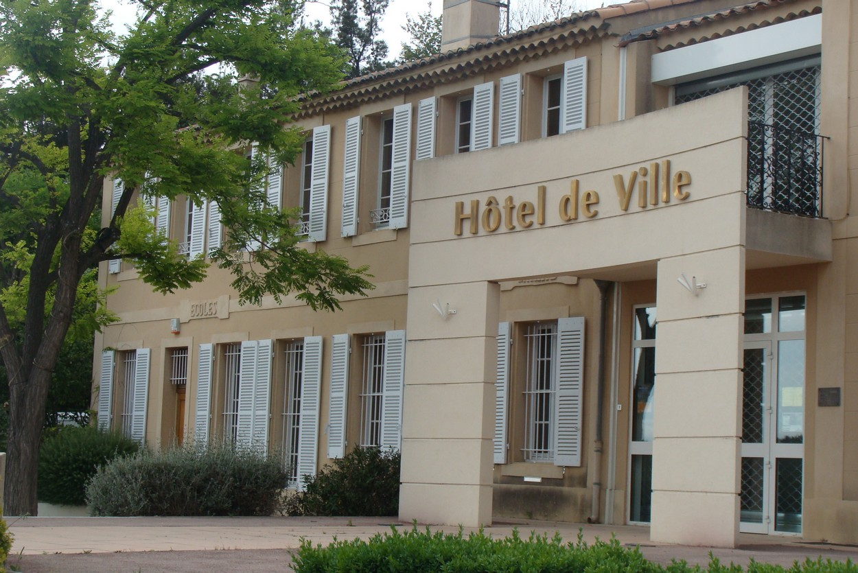 Mairie et écoles communales de Belcodène (Bouches-du-Rhône).